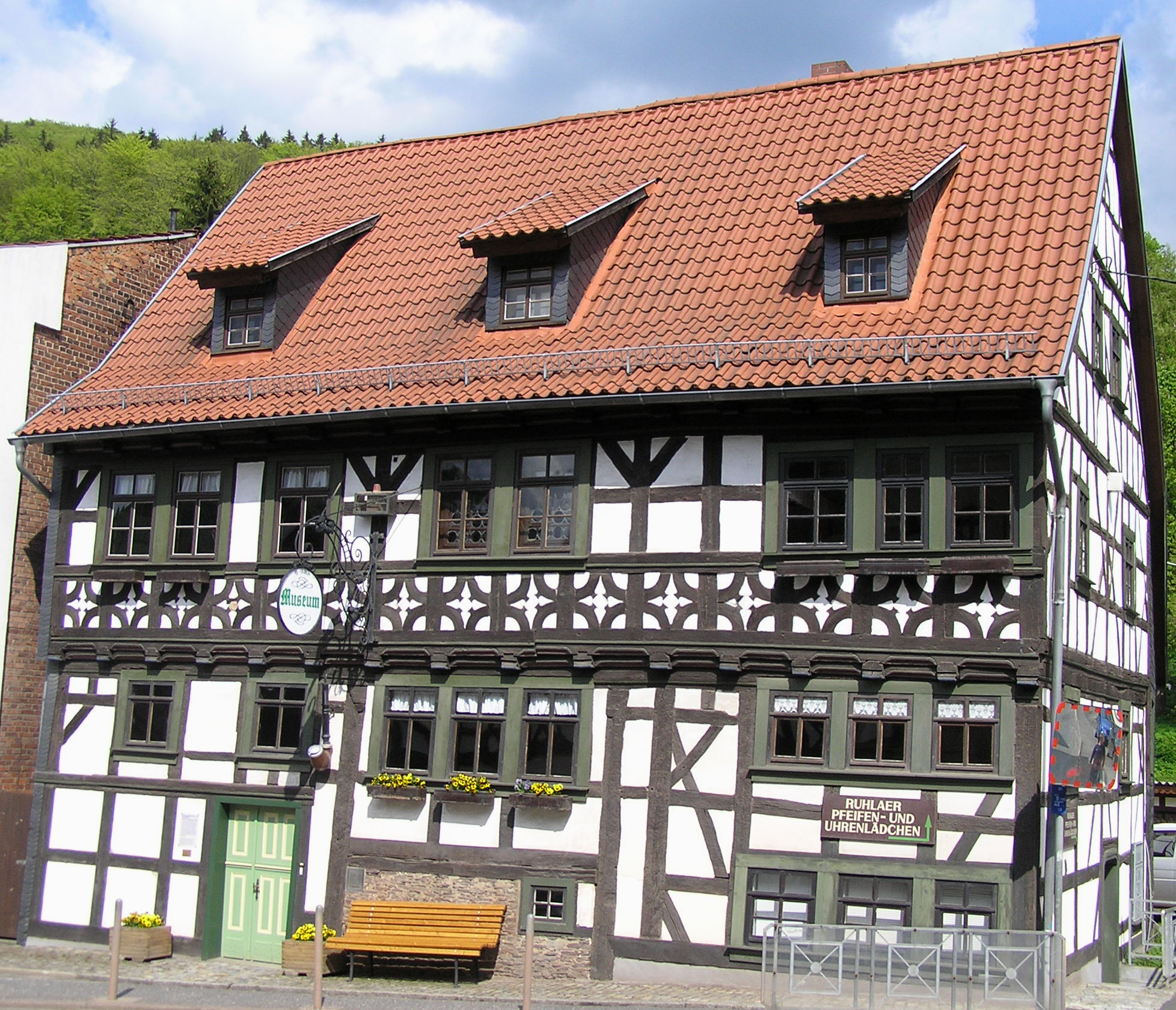 Ruhlaer Orts- und Pfeifenmuseum